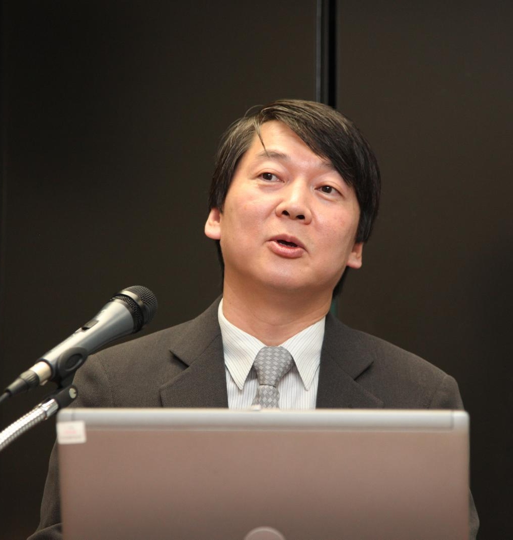 안철수 편집본